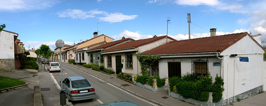 Abetxuku auzoa (Gasteiz) / Barrio de Abetxuko (Vitoria)